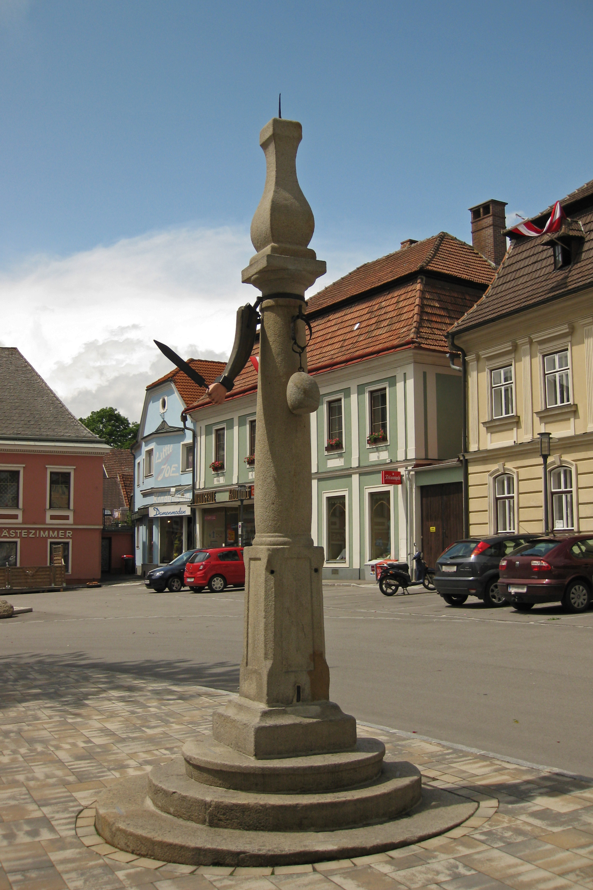 Der Pranger mit Steinkugel wurde wahrscheinlich am Ende des 17. Jahrhunderts erbaut.